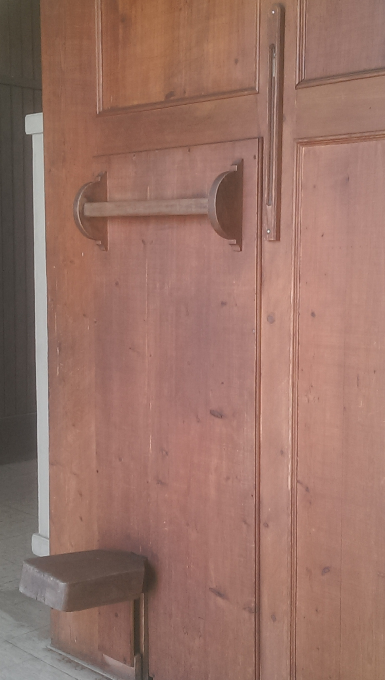 Schlimbach Orgel